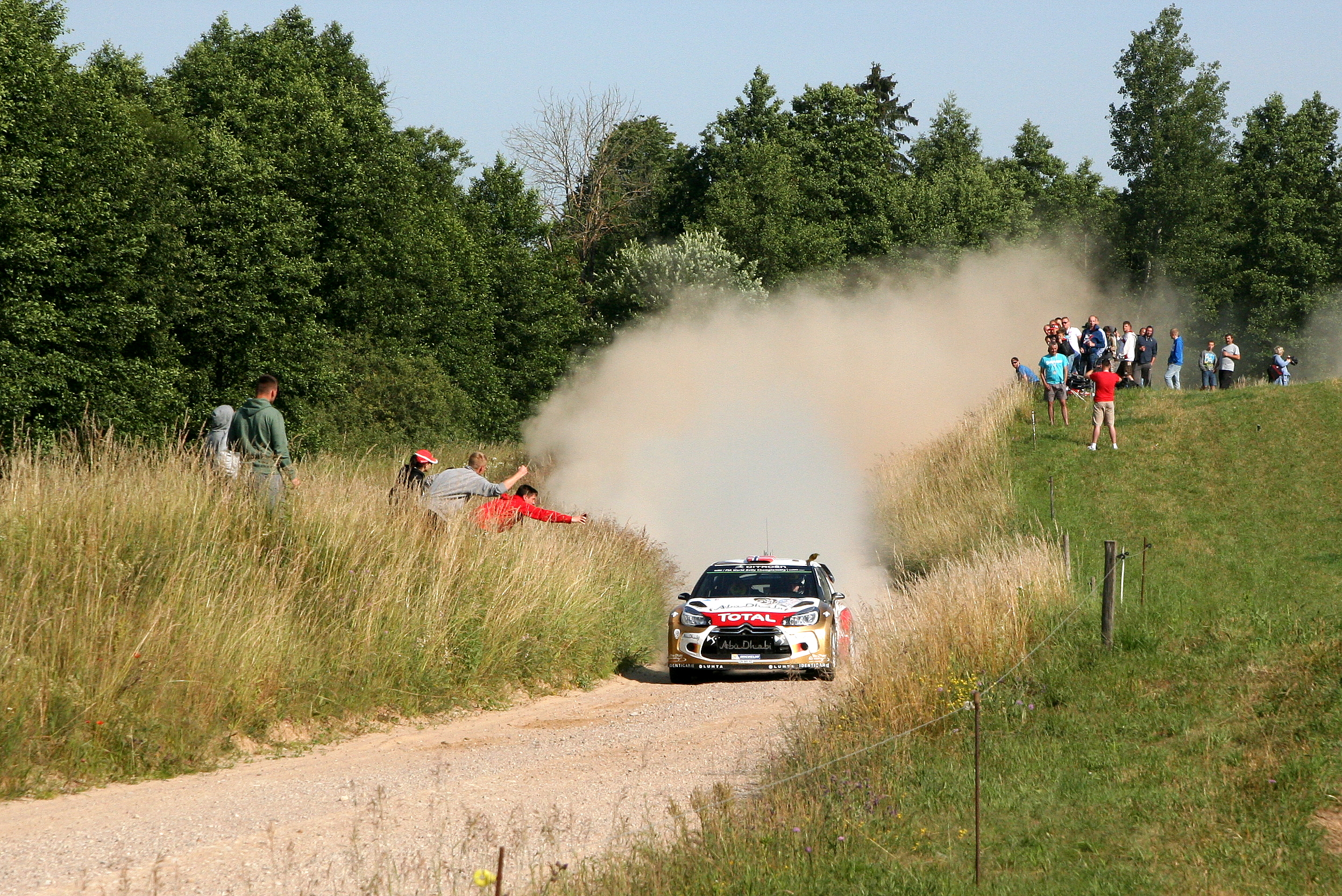 Mads Ostberg podczas Rajdu Polski 2014, 11 OS Chmielówka 1